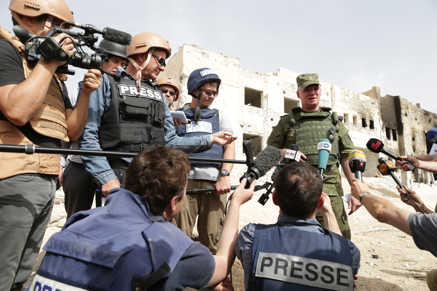 Министерства обороны Российской Федерации генерал-майор Игорь Конашенков с журналистами в Эль-Карьятейне (Сирийская Арабская Республика)